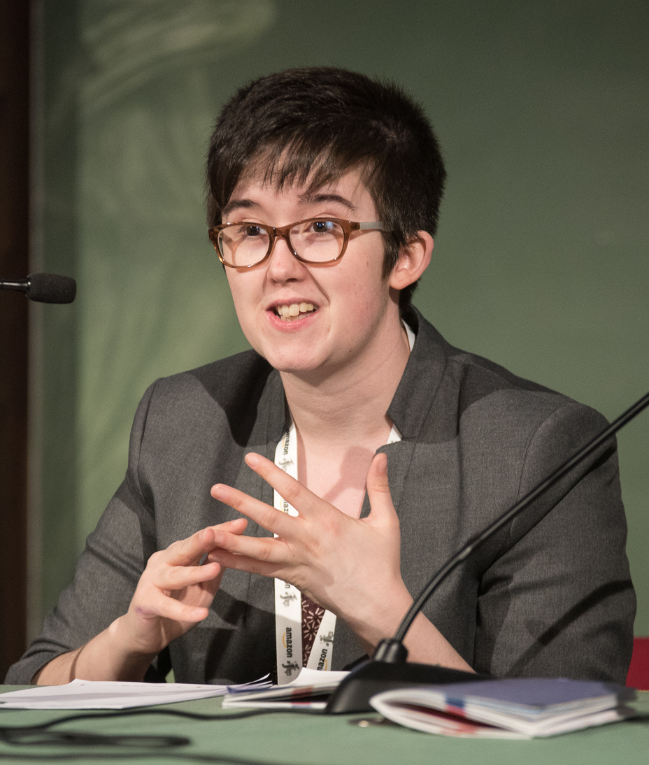 Lyra McKee video: [1]